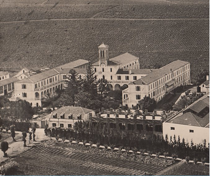 Maison-Carrée (Algérie), maison-mère des Pères blancs, missionnaires d'Afrique, fondés par Mgr Lavigerie.